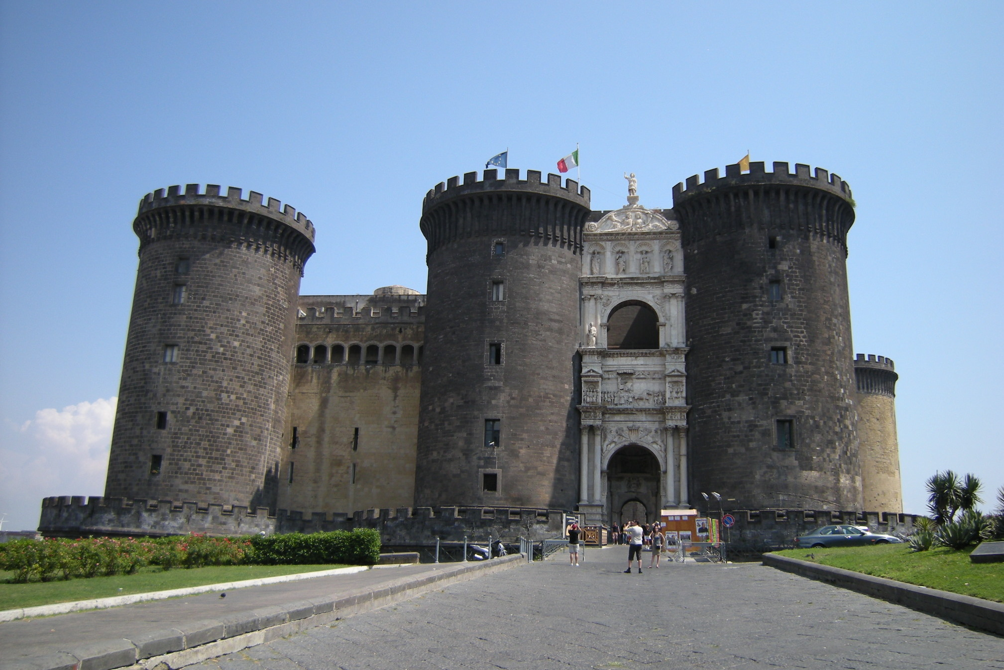 Também conhecido como "Castel Nuovo". Nápoles, Italia